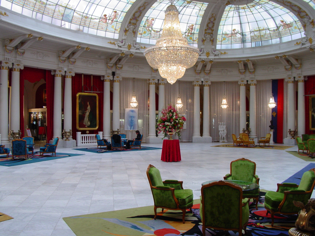 Intérieur de l'hôtel Negresco à Nice-france